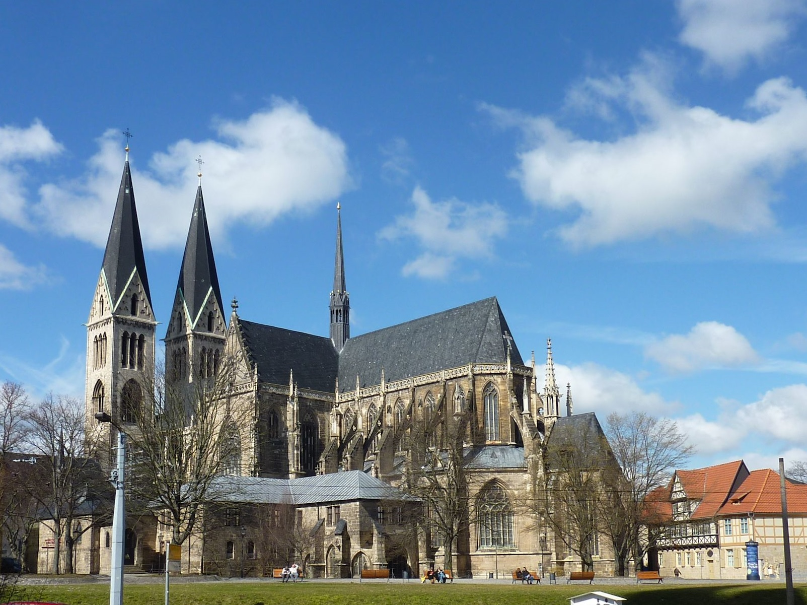 Halberstadt